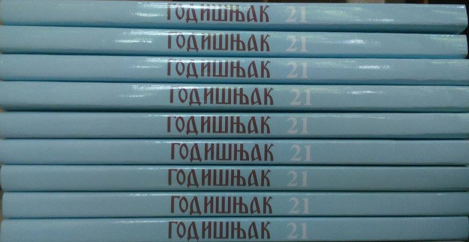 Godišnjak (Fakultet sporta i fizičkog vaspitanja, Beograd)